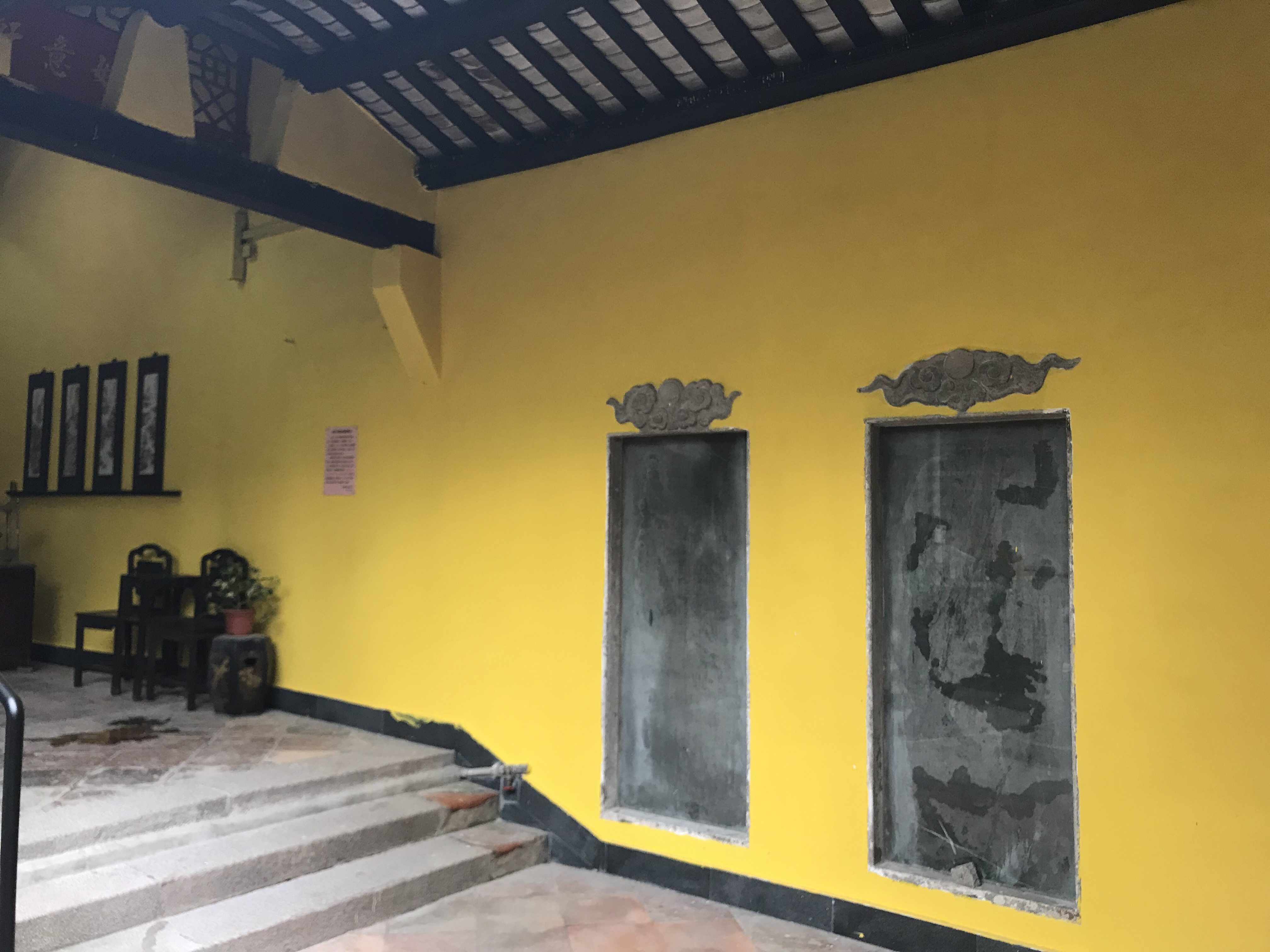 受非法工程破壞的普濟禪院，牆身顏色有違原有風格